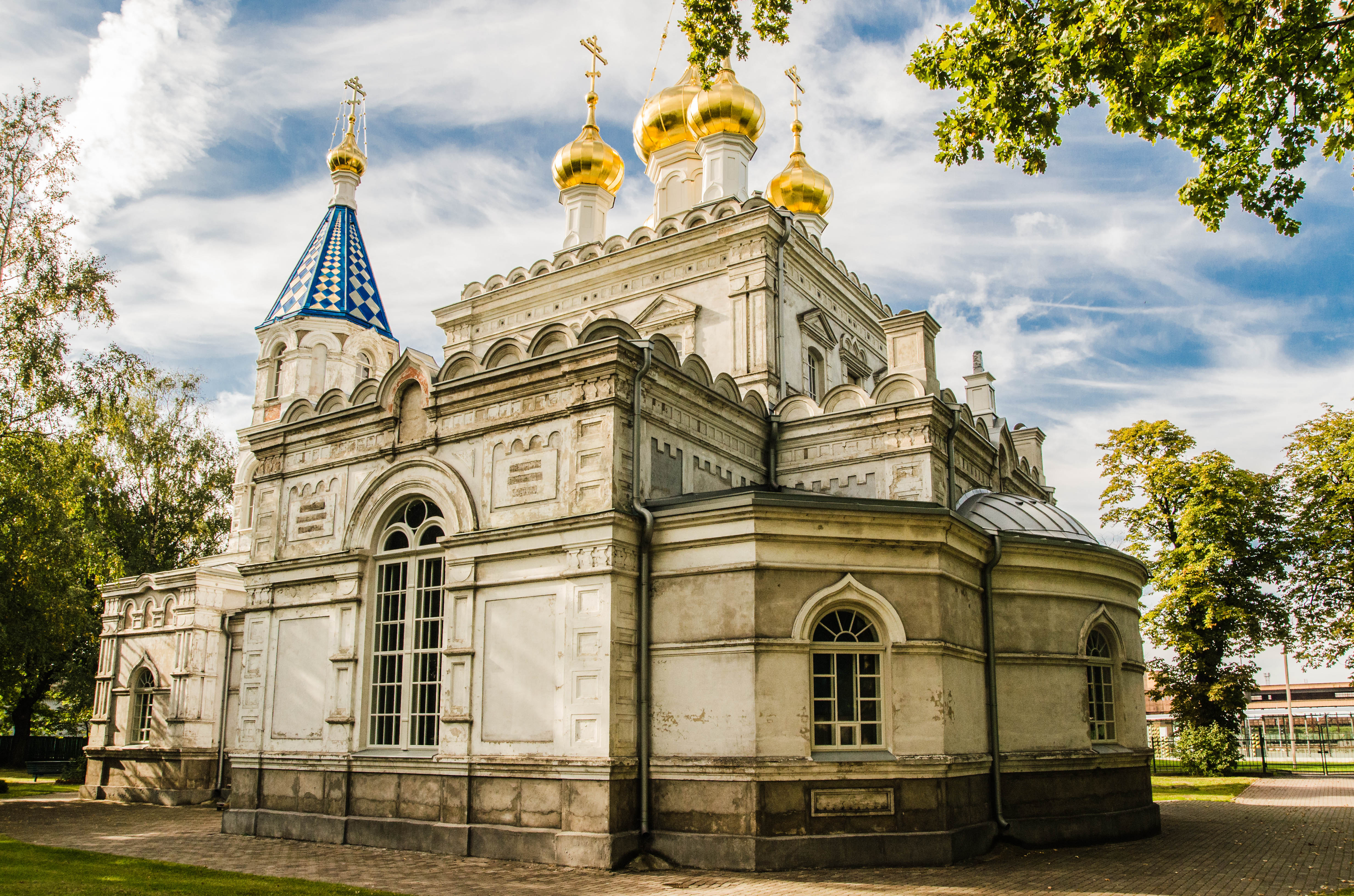 Ventspils Sv.Nikolaja pareizticīgo baznīca, Ventspils, Plosta iela 10